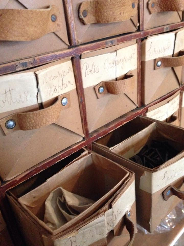 Små lådor i närbild på Borgquistska Hattmuseet